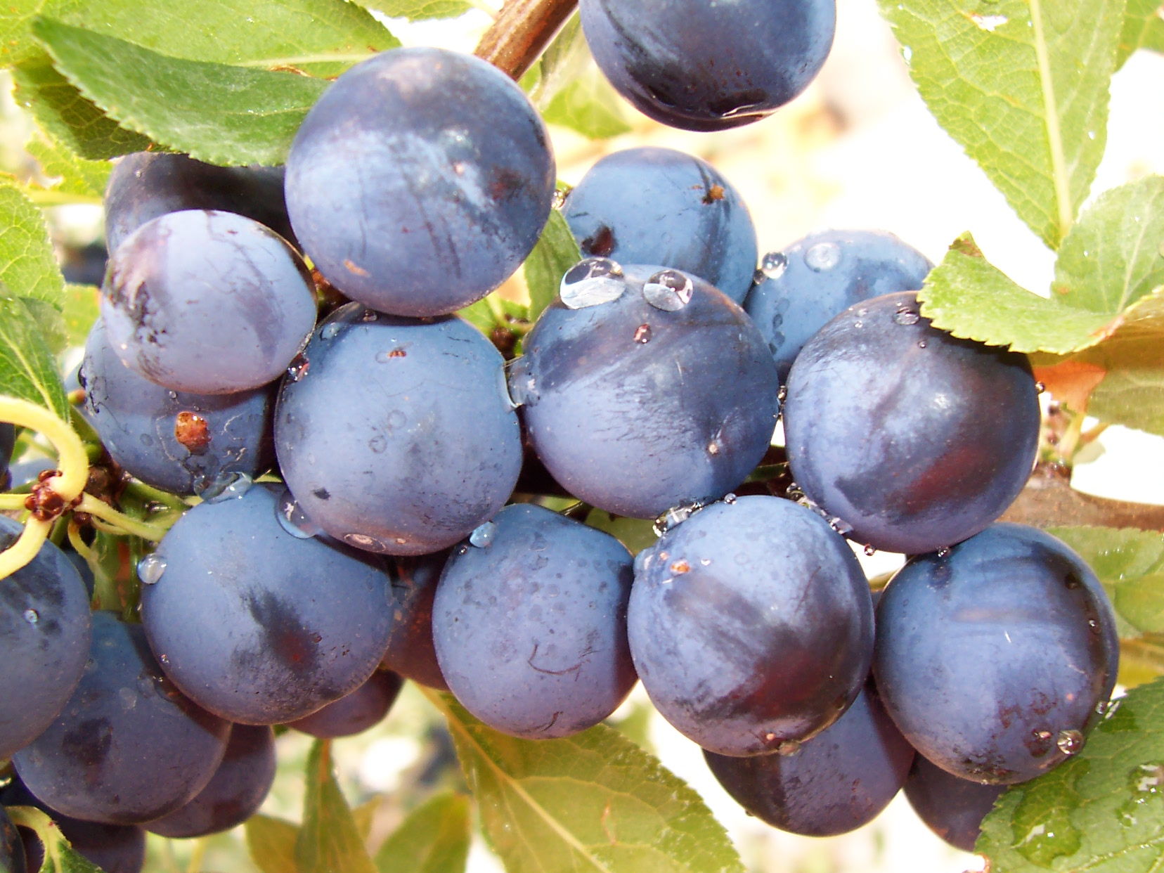 Categoría:Plantas (imagen)